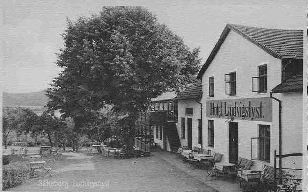 Traktørstedet Ludvigslyst, tidligere Hotel Ludvigslyst, ved Sejs, Silkeborg Kommune